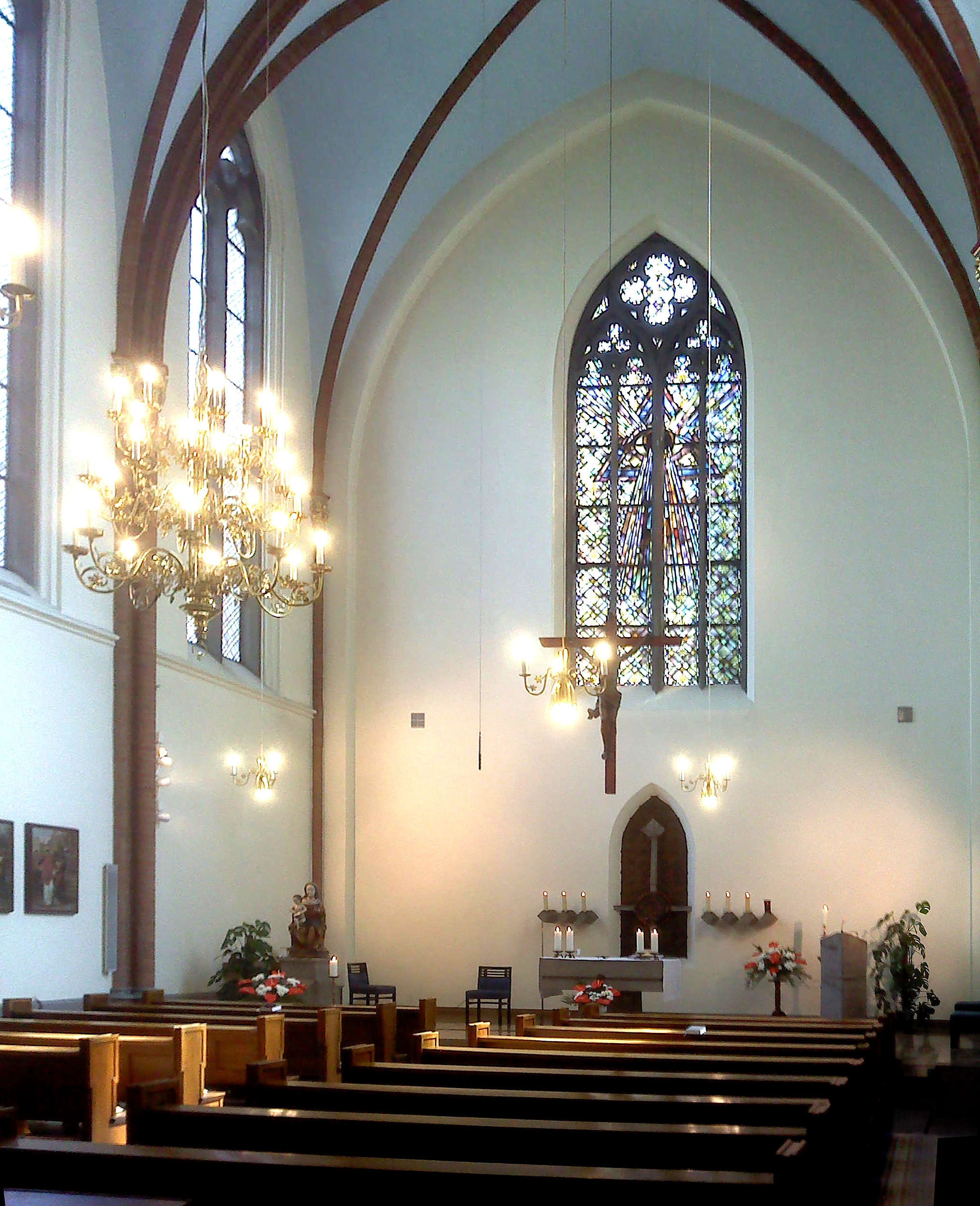 Marienkapelle im St. Hedwig-Krankenhaus: Altarseite